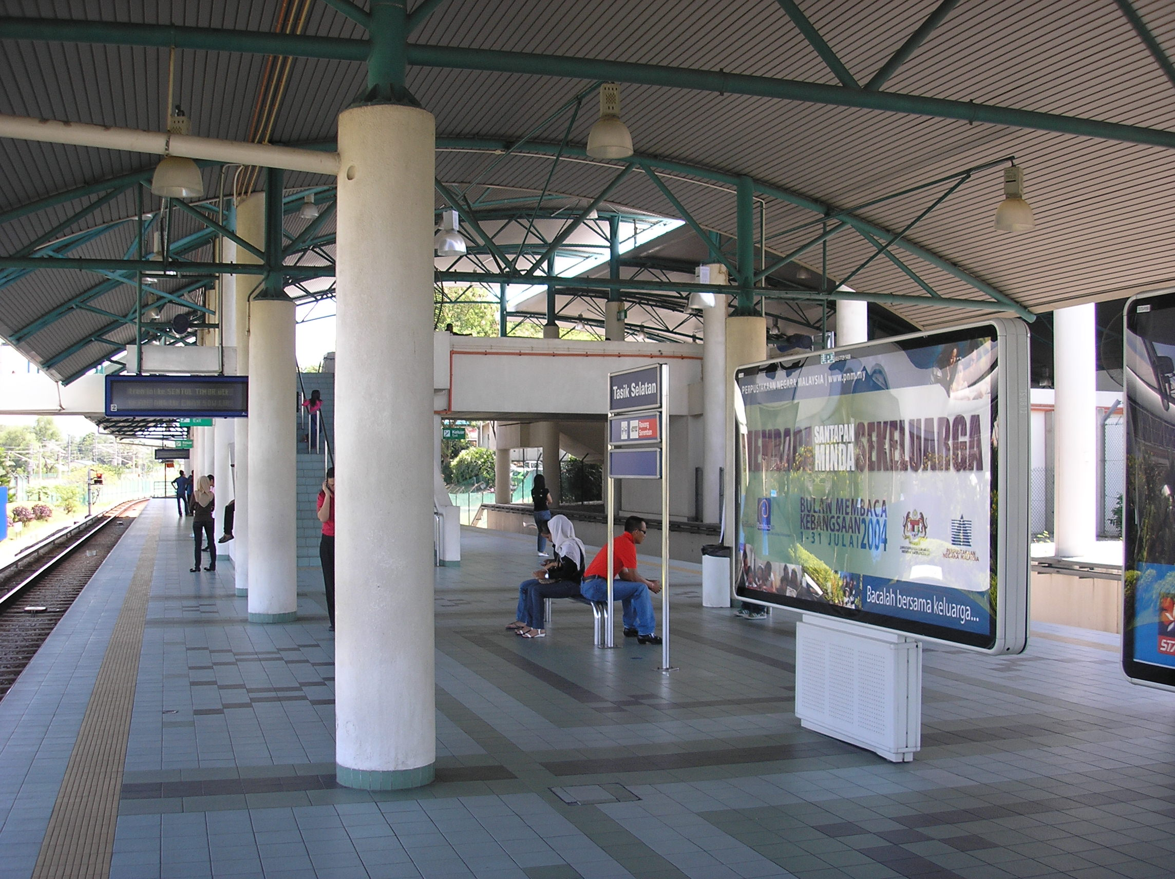 The Bandar Tasik Selatan station (Sri Petaling Line), Klang Valley, Malaysia.